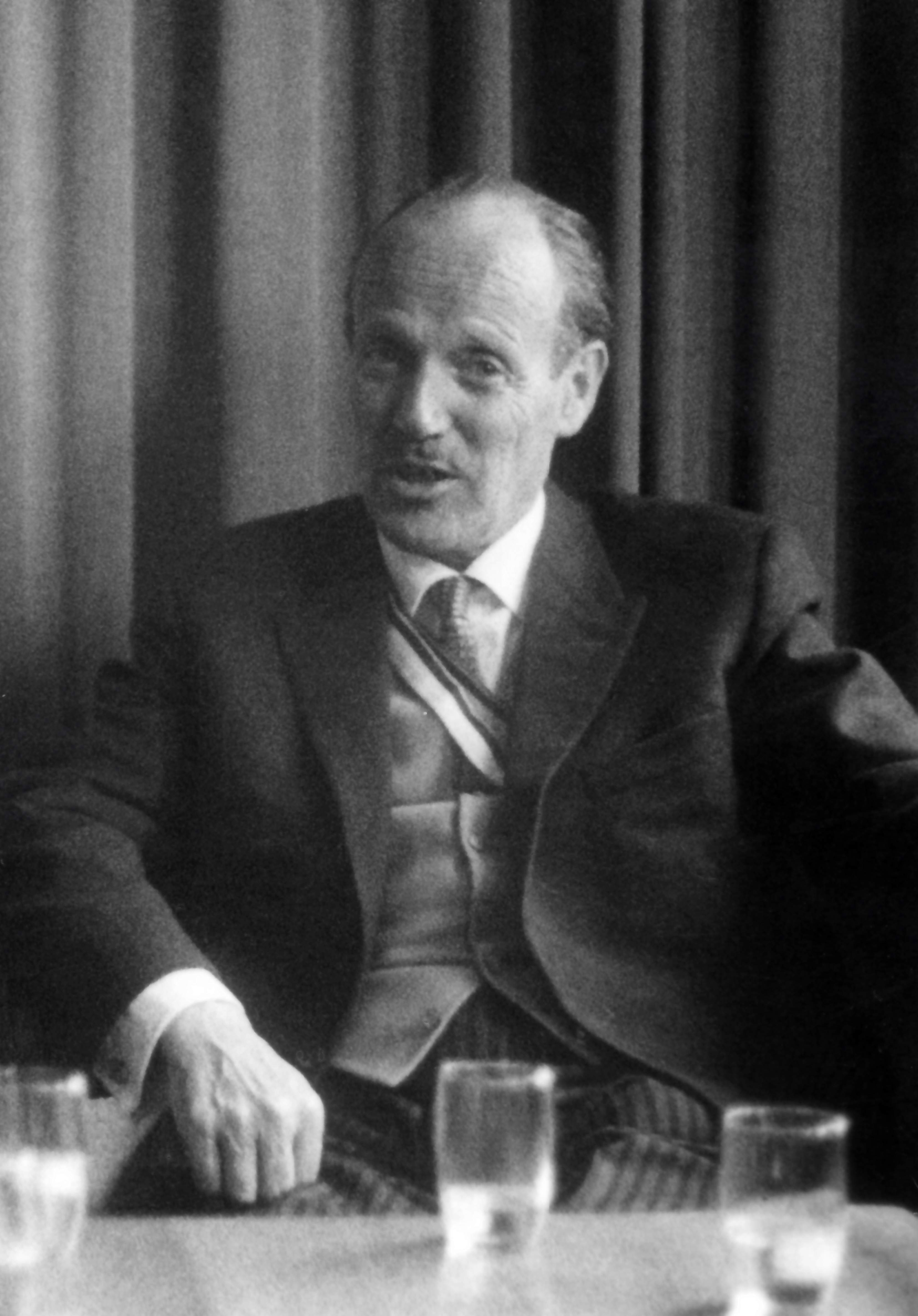 Fotografie von Werner Lederle